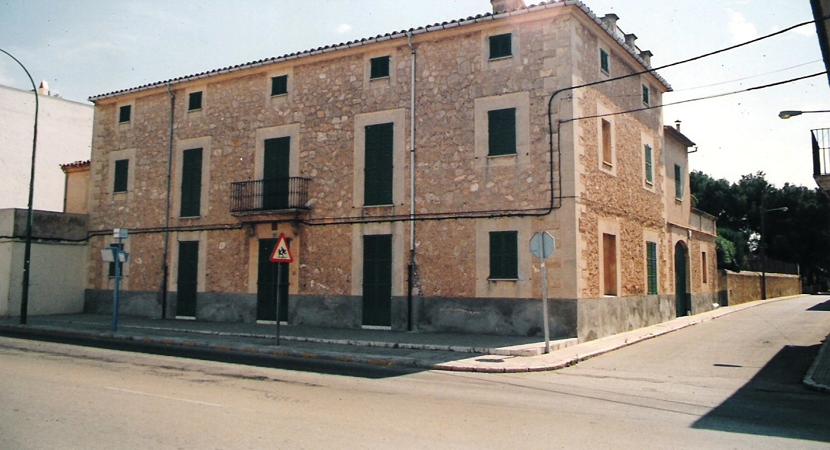 Son Sales